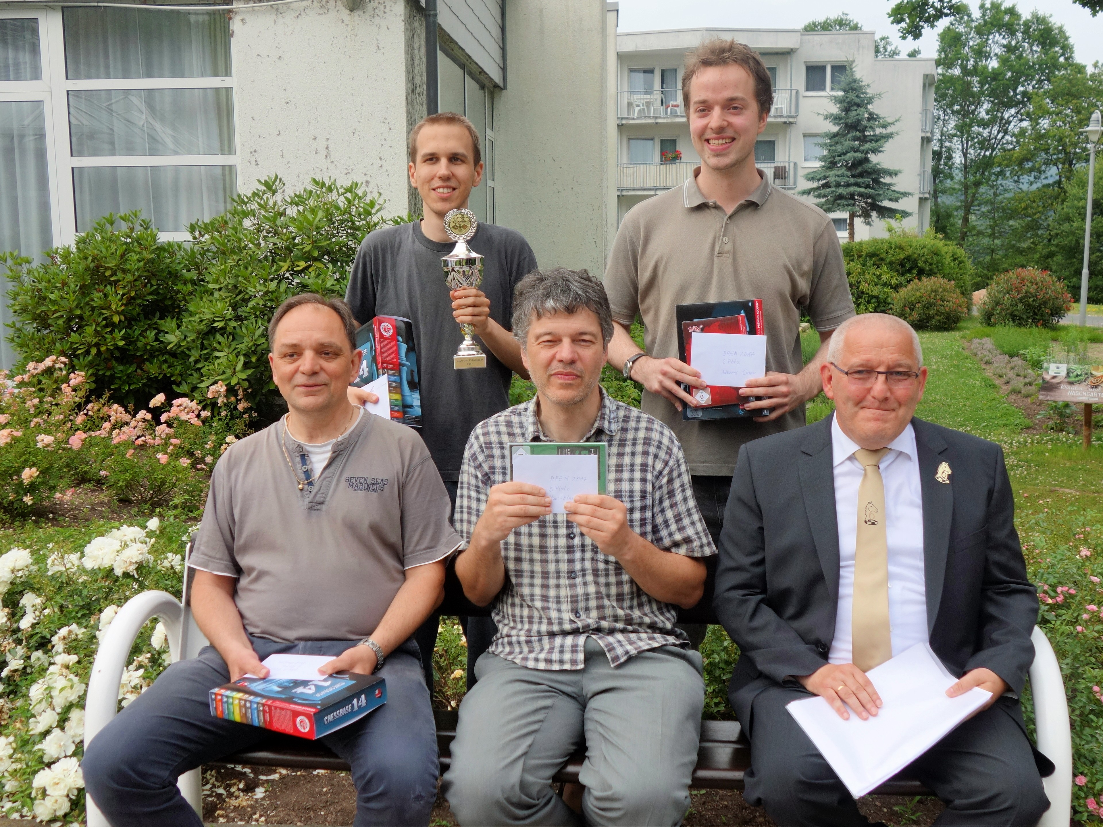 Erste Dähne-Pokal 2017 in Niedernhausen. Links hinten mit Pokal der Sieger Hagen Poetsch. Rechts hinten Johannes Carow (2.). Vorn in der Mitte Hans-Elmar Schwing (5.).